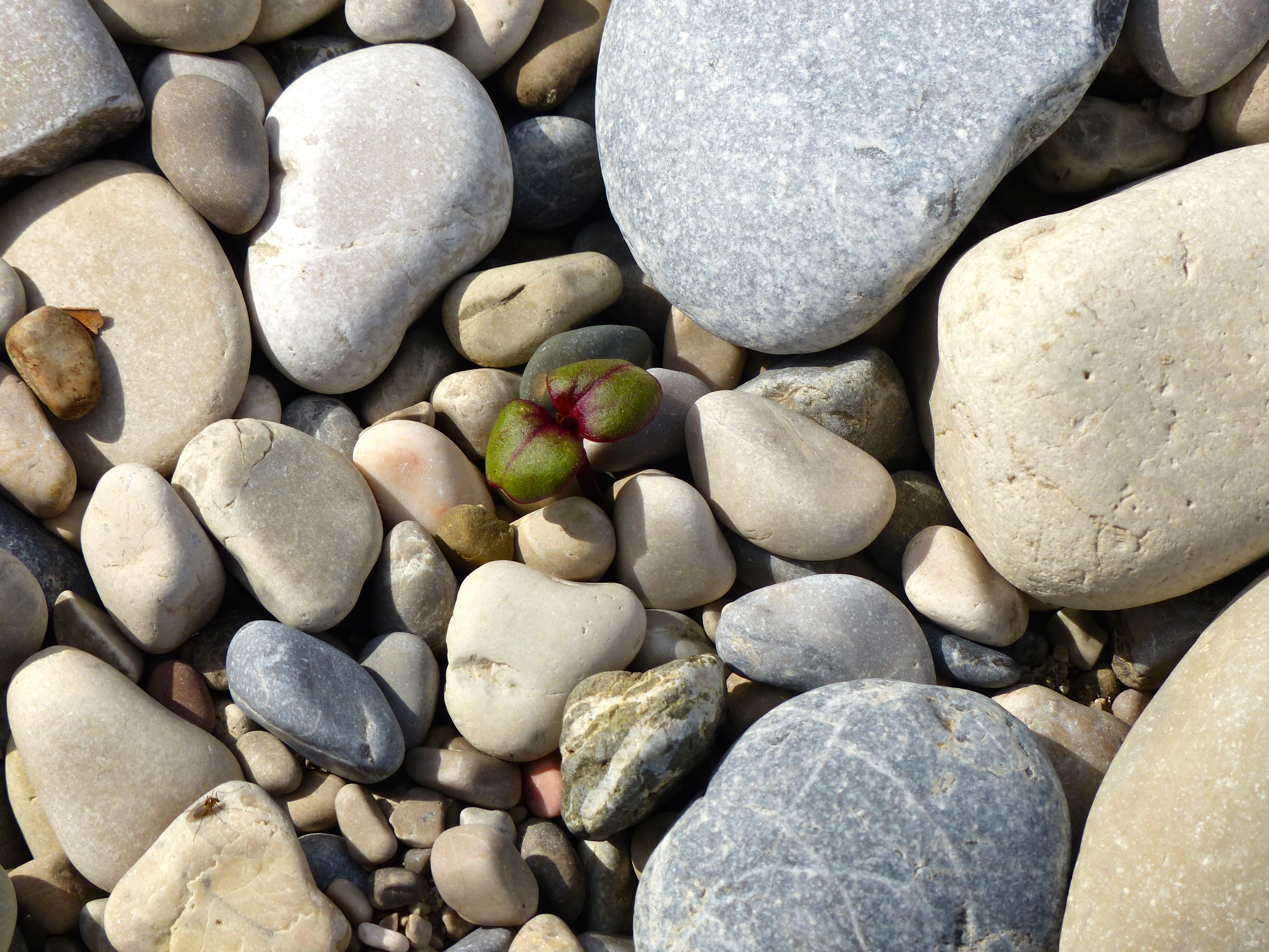 LSG Isarauen: Isar Höhe Museumsinsel: Isarschotter